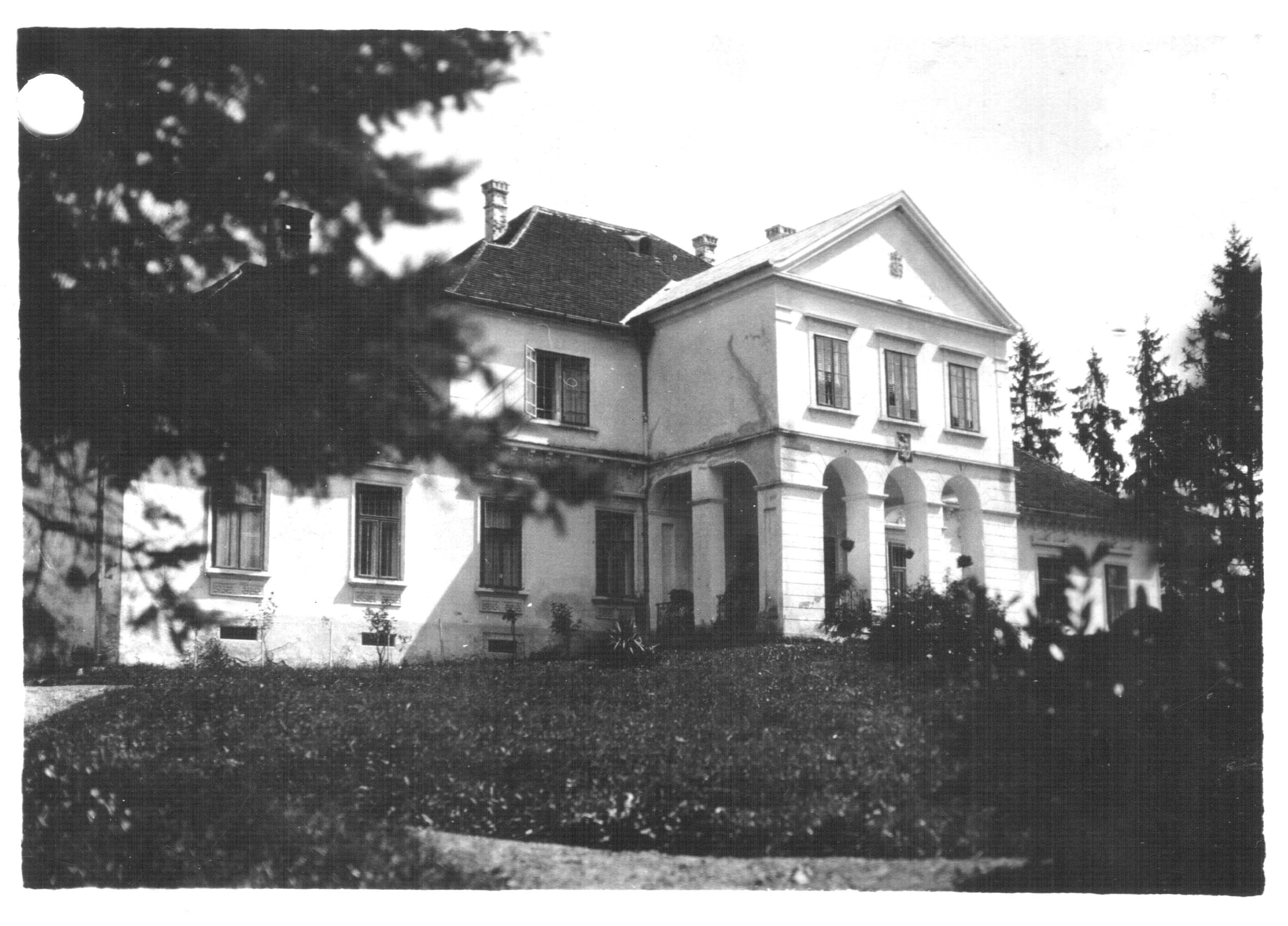 Ismeretlen fényképész. Papír, 11,5x9 cm. A fényképet levelezőlapra ragasztották. A levelezőlap szövege: (Címzés: Méltóságos Dr. Rosenberg Antalné úrasszonynak Budapest IX. Ráday u. 15. I.em) a Kedves néninek sok szívélyes üdvözletet küld szép misefai otthonából Bosnyák Andorné Klárika Misefa, 1939. X. 7 A kastélyt Fábiánics Ignácz királyi főtanácsos és főjegyző építtette. Később Bosnyák Gézának, az Első Magyar Takarékpénztár egyik alapítójának otthona. Őspark, Arborétum. 8935 Misefa, Béke u. 2 szám telefon: 0630 987 4426 ©© Derzsi Elekes Andor, Budapest, 2013, You are authorised to use these photos and vids under Creative Commons – even for commercial, for profit purposes. Photos must be attributed to Derzsi Elekes Andor. All of the photos and vids in the Metapolisz DVD line are under Creative Commons and can be used even for commercial – for profit – purposes. Recommended Citation Derzsi Elekes Andor: Metapolisz DVD line Beszerzés: Darabanth 198. Gyorsárverés/11927 sz. tétel. Forrás: Építészetünk a két világháború között Források